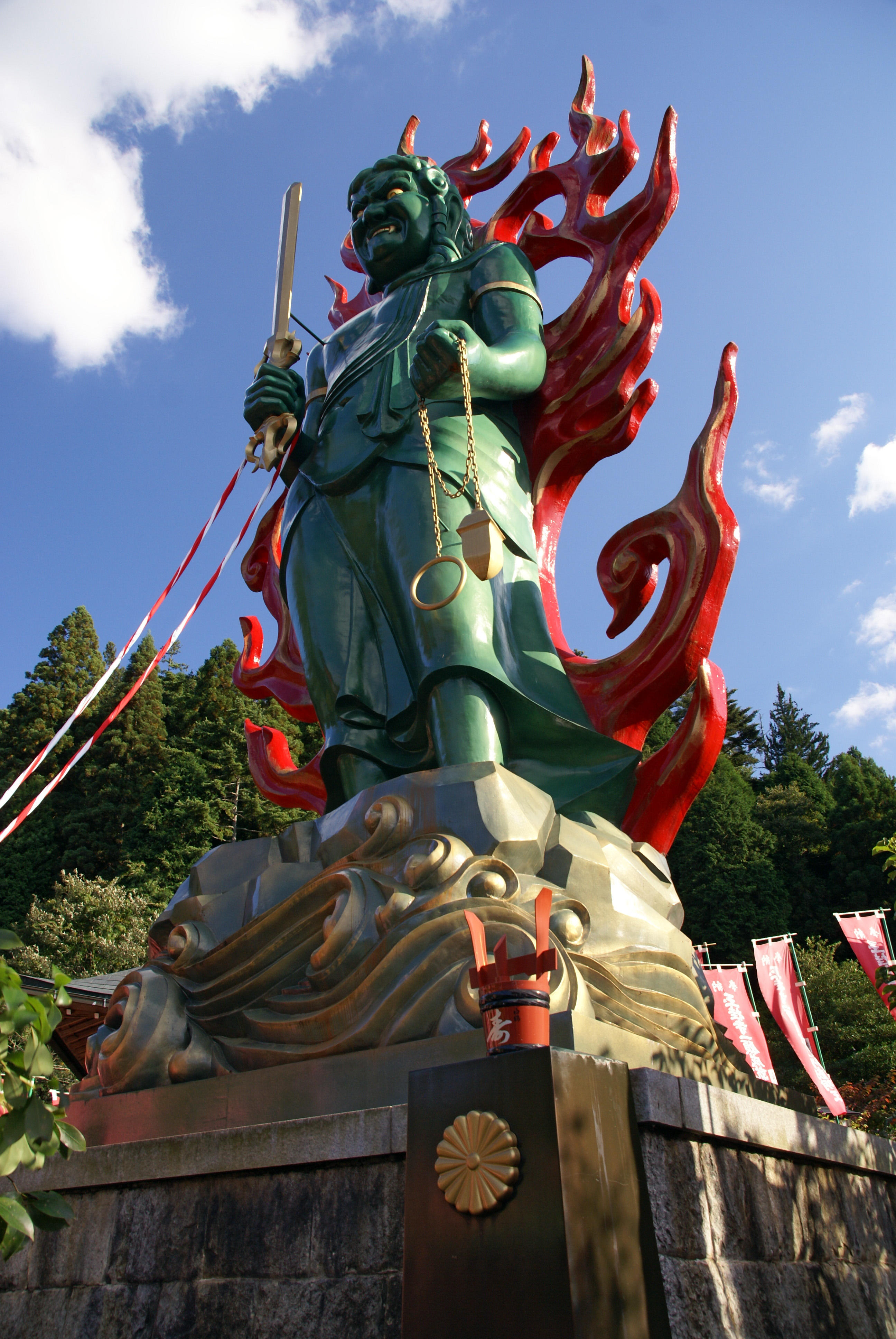 Gyokkeiji in Koka, Shiga prefecture, Japan